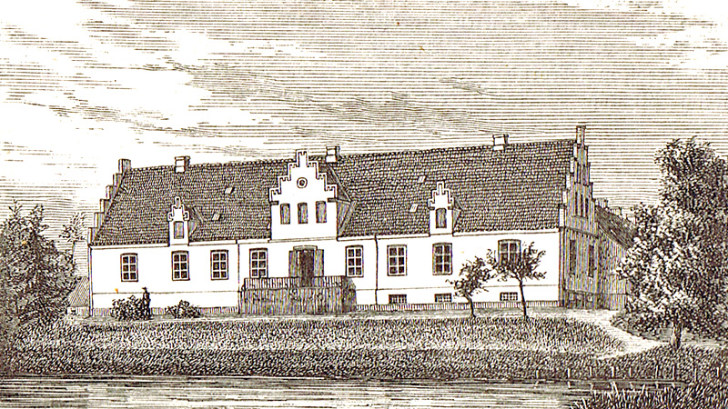 Elvedgård er en herregård, som nævnes første gang i 1436. Gården ligger i Veflinge Sogn, Skovby Herred, Søndersø Kommune. Hovedbygningen er opført i 1721 og ombygget i 1860`erne.